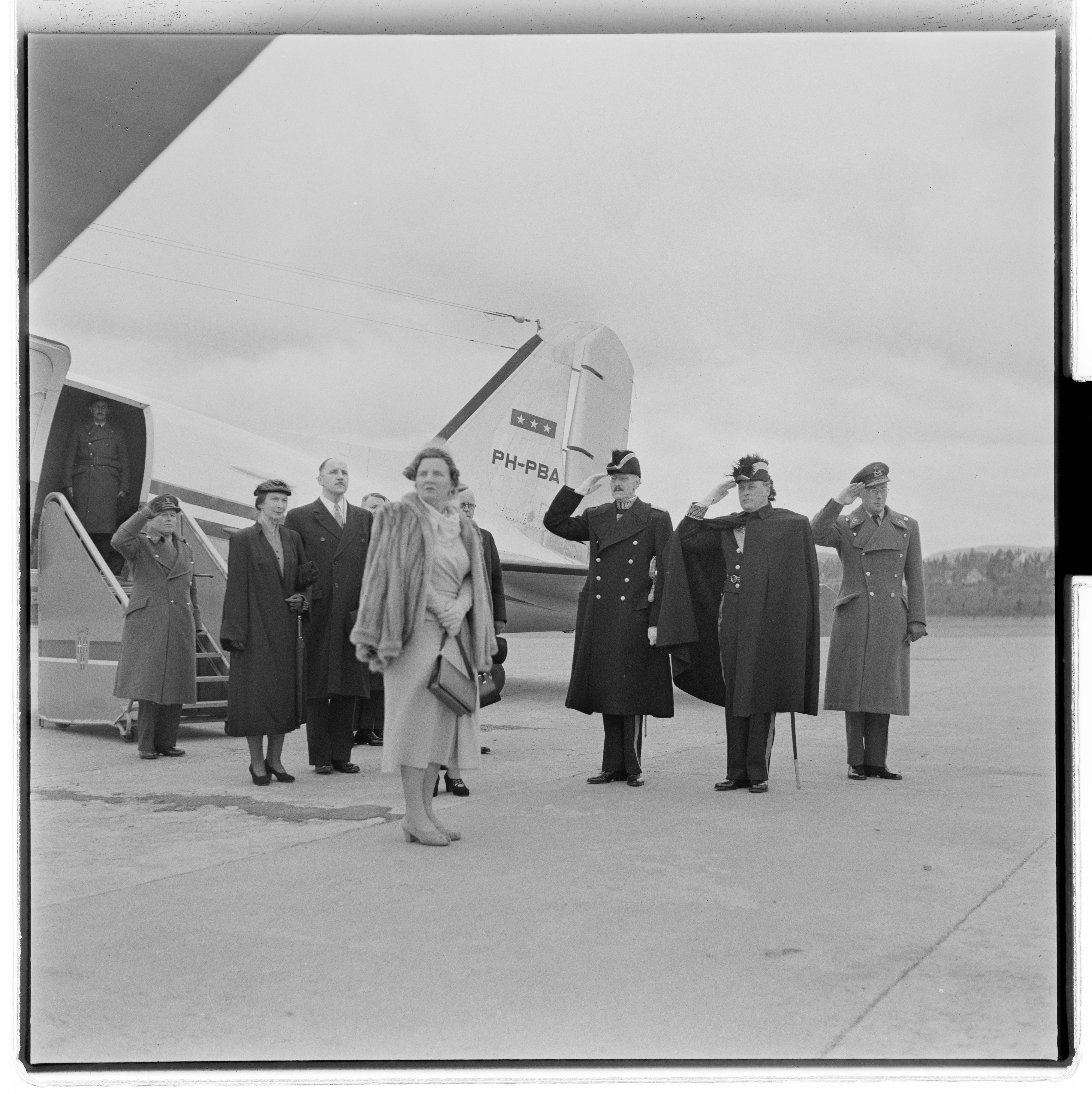 Bildet er hentet fra Arkivverket. Juliana, dronning av Holland, og prins Bernhard. offisielt besøk i Oslo. NÅ nr. 10, 1953. Arkivinstitusjon : Riksarkivet Arkivnavn : Billedbladet NÅ Sted : Norge, Oslo, Oslo, Avbildet